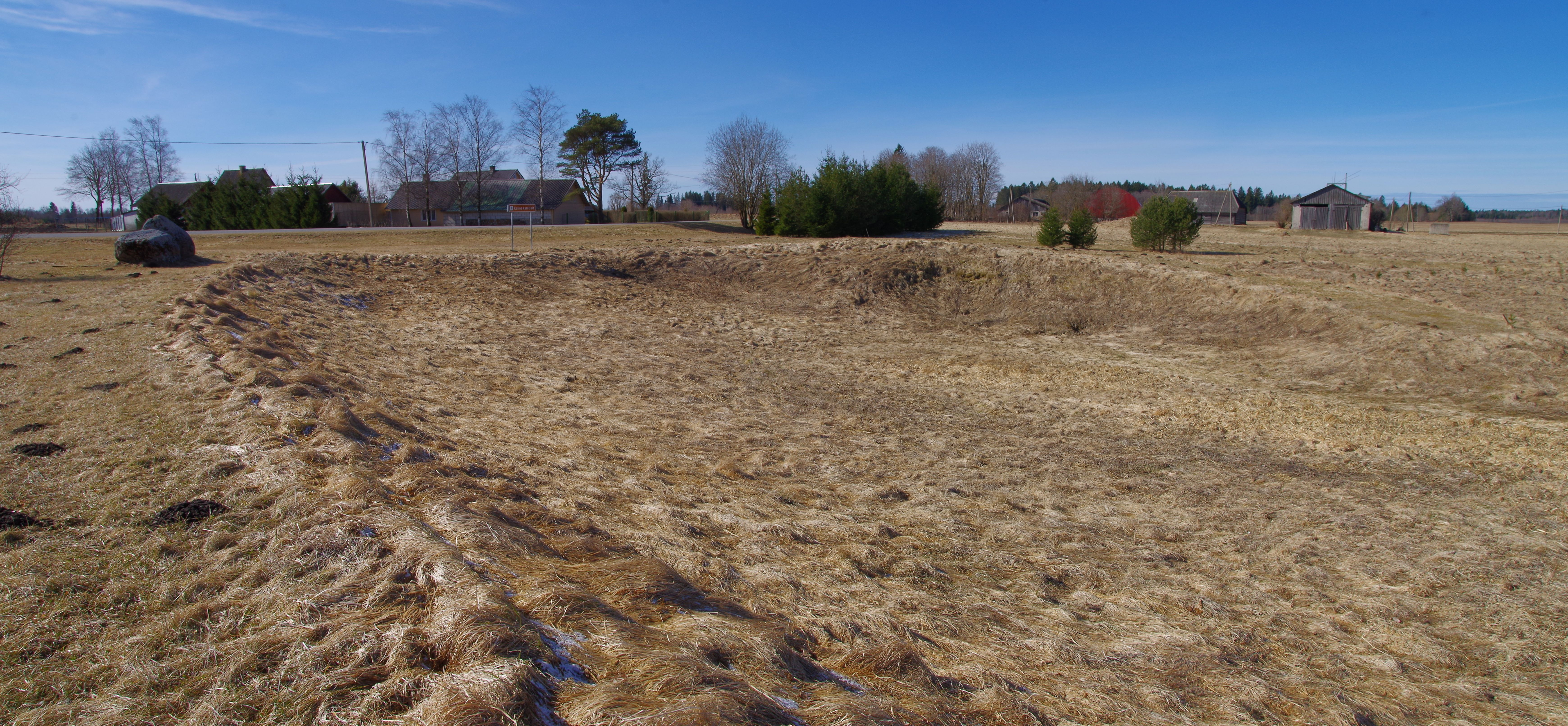 Kalina karstiala on kaitstav karstiala Ida-Viru maakonnas Alutaguse vallas Kalina külas. Karstiala pindala on 1 ha.Karstialal asub Kalina kurisu, mis on 60 m pikk, 20 m lai ja 2,7 m sügav.